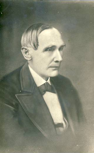 MuuseumikoguFotokogu OlemusfotoDateeringDateering: 19.saj II poolOriginaaloriginaalSäilivushea